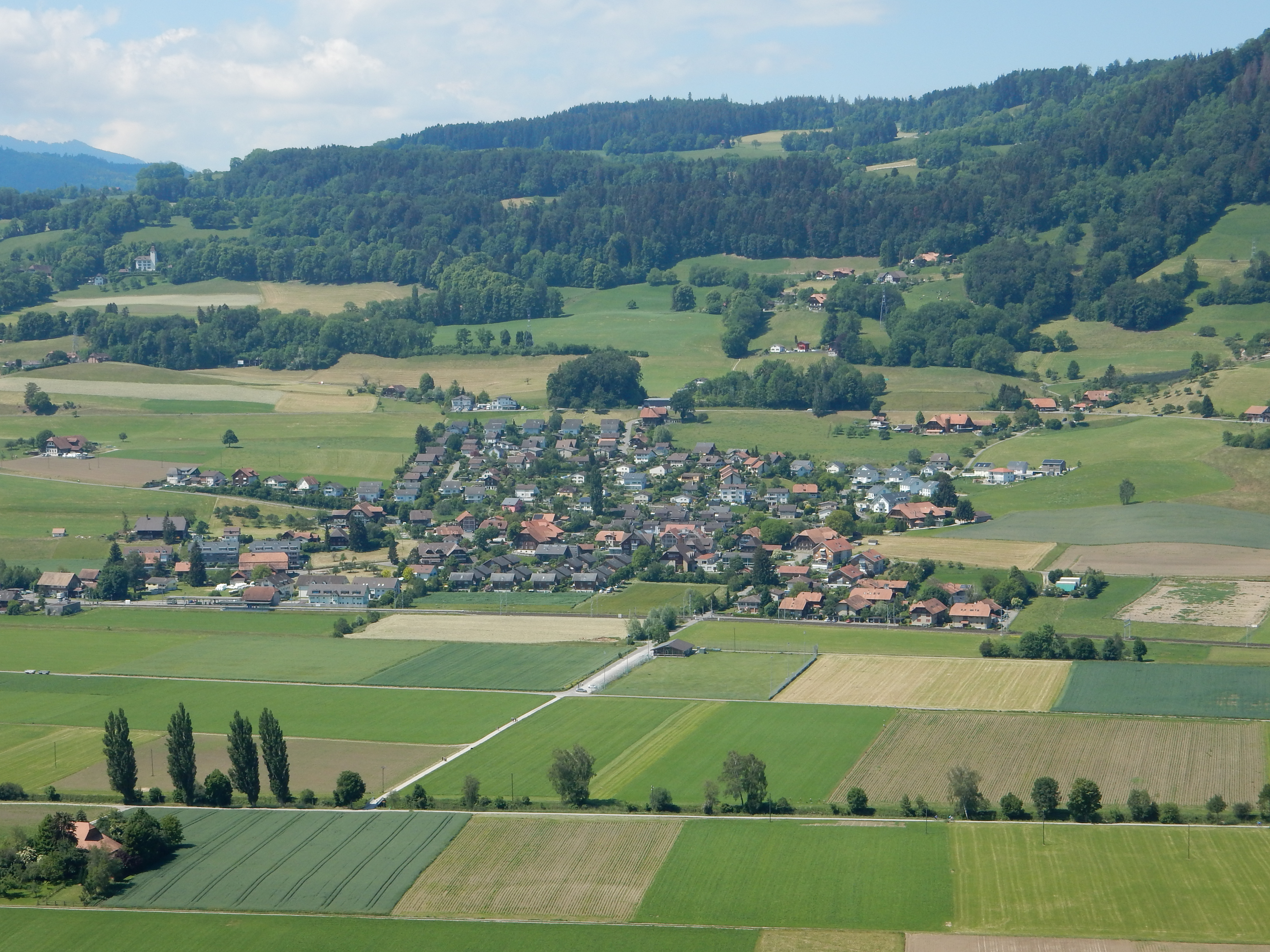 Kaufdorf (Kanton Bern, Schweiz) vom Belpberg aus gesehen